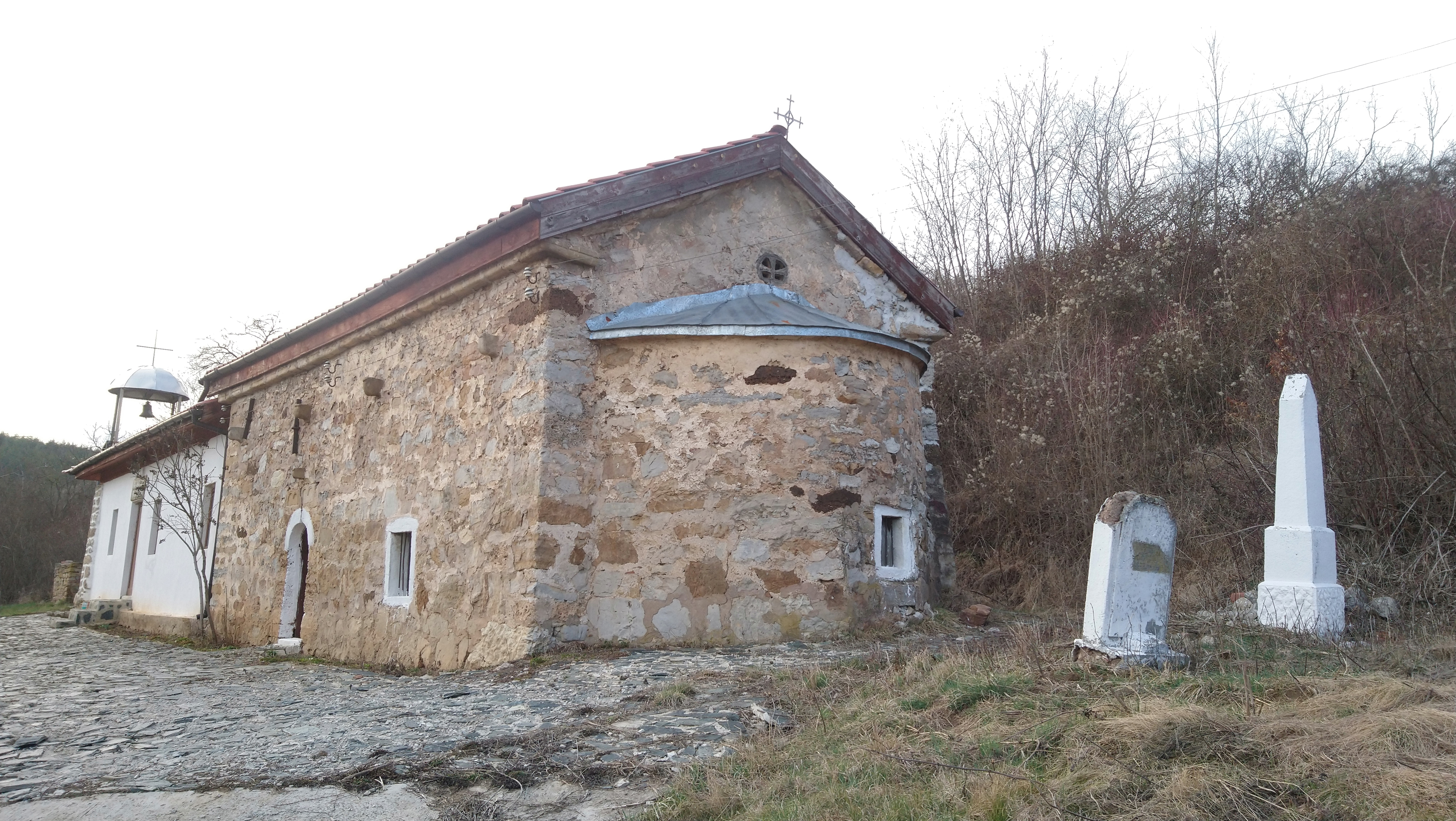 Църква Св Николай Чудотворец в село Туден, Община Годеч